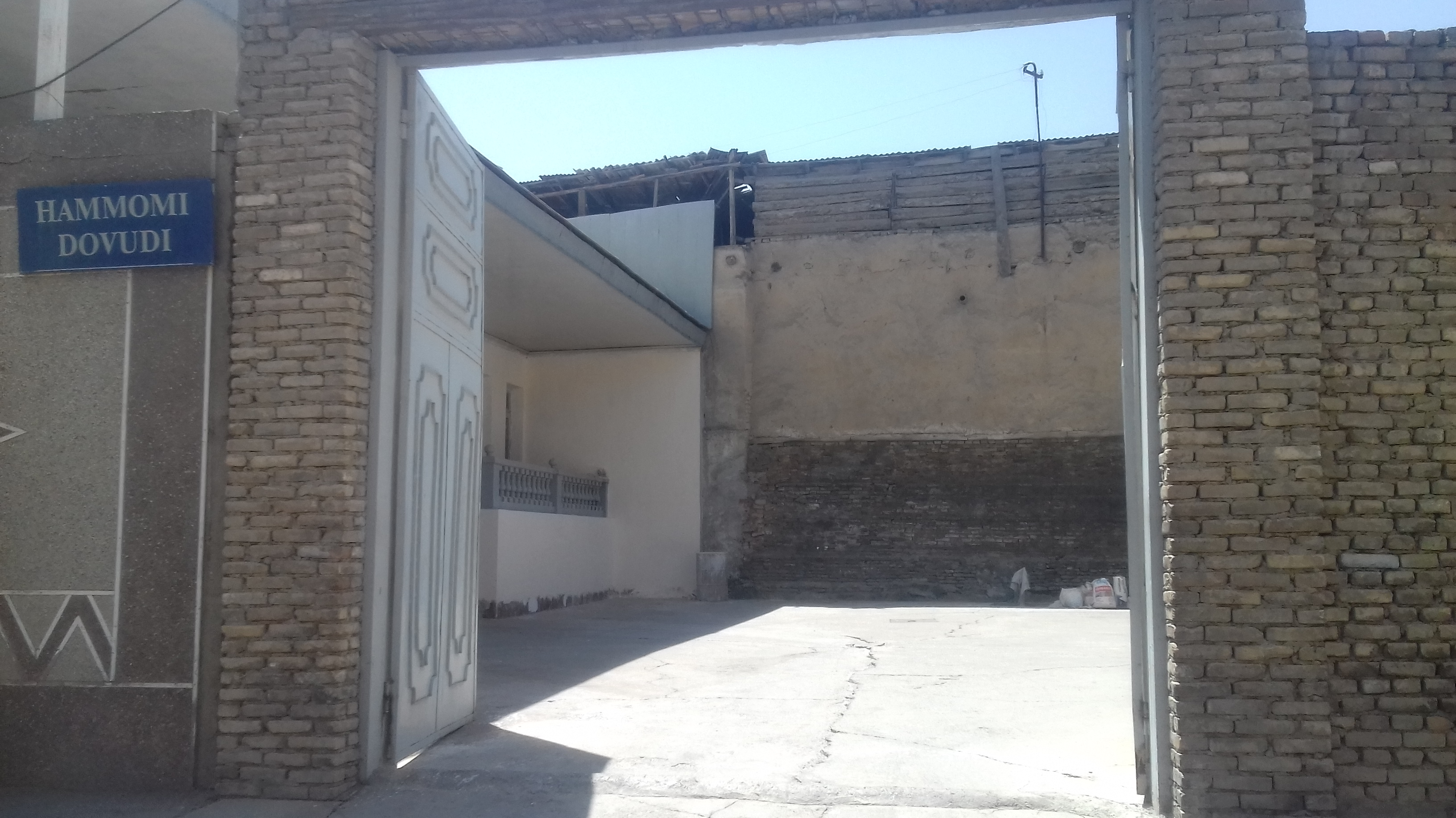 Хаммами Давуди в Самарканде